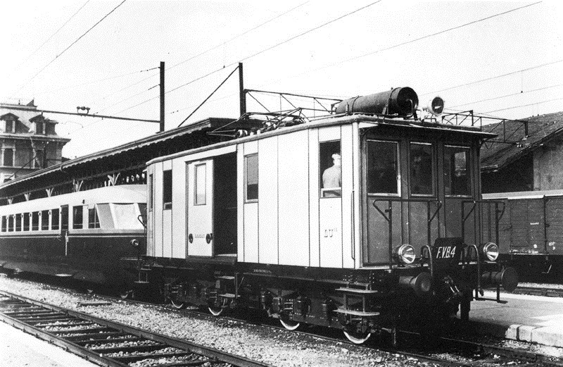 Locomotiva 4 della Ferrovia Valle Brembana in sosta a Bergamo